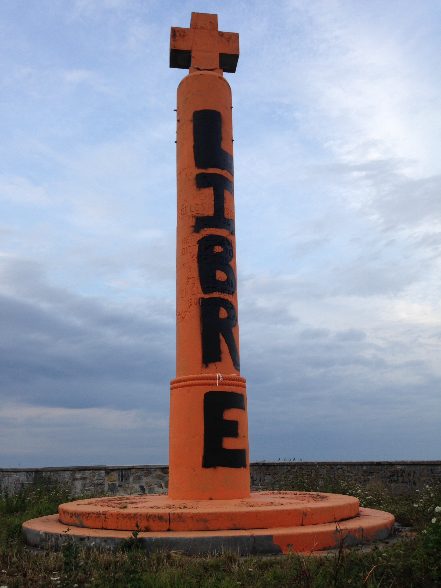 Monumento a los Caídos por Dios y por España en la guerra civil de 1936. La inscripción reza "En memoria de los hijos de Ondarroa que heroicamente dieron su vida por Dios y por España en el crucero Baleares"